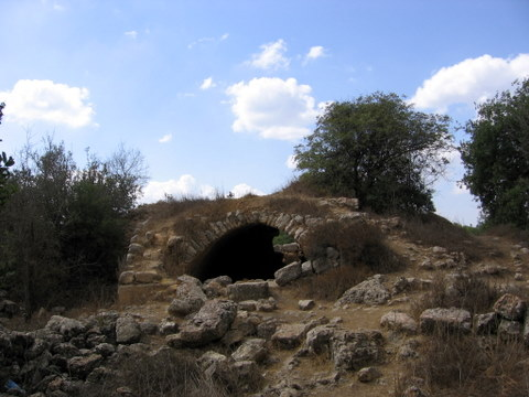 saadim